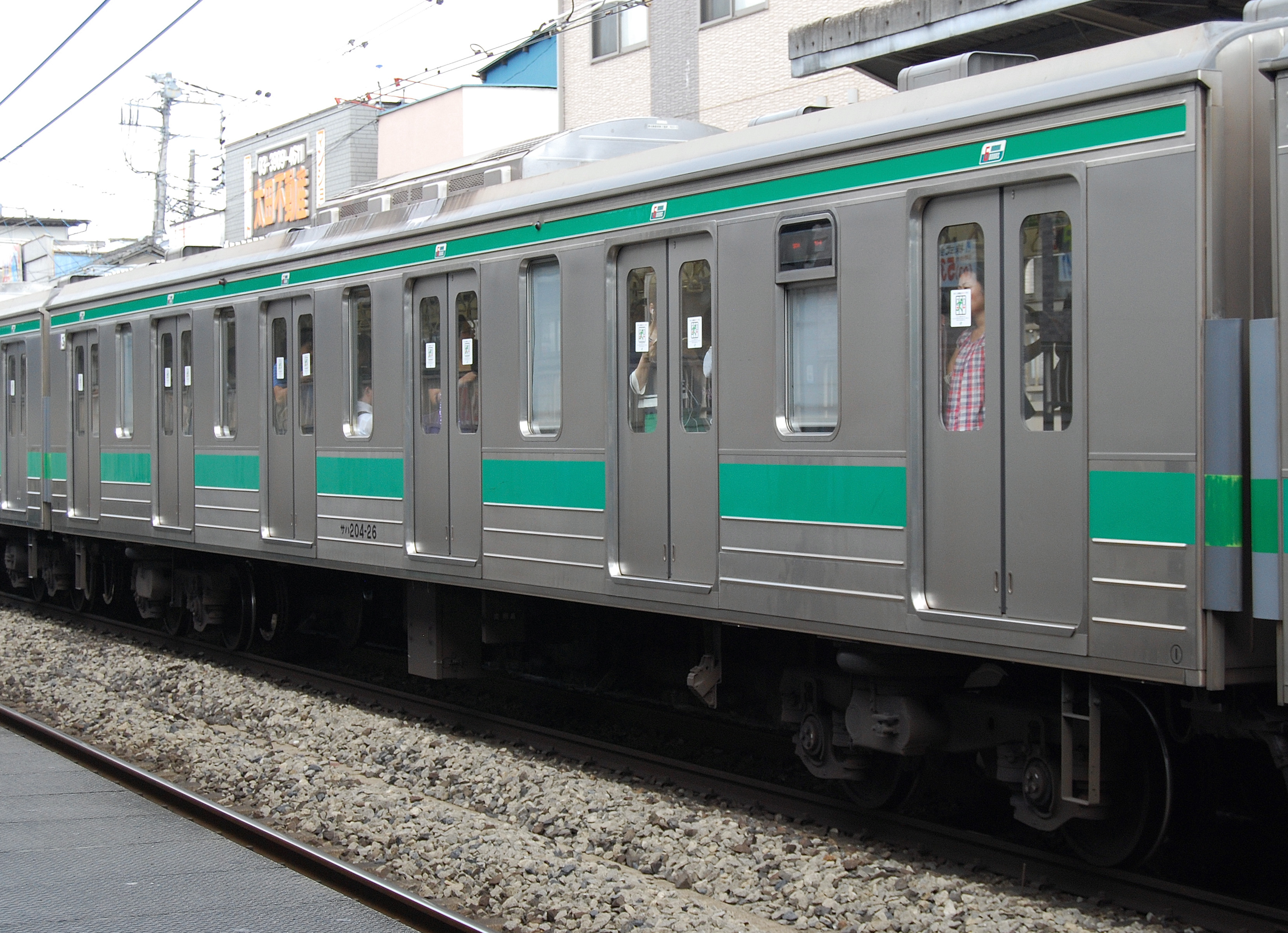 サハ204形0番台（十条駅にて撮影）